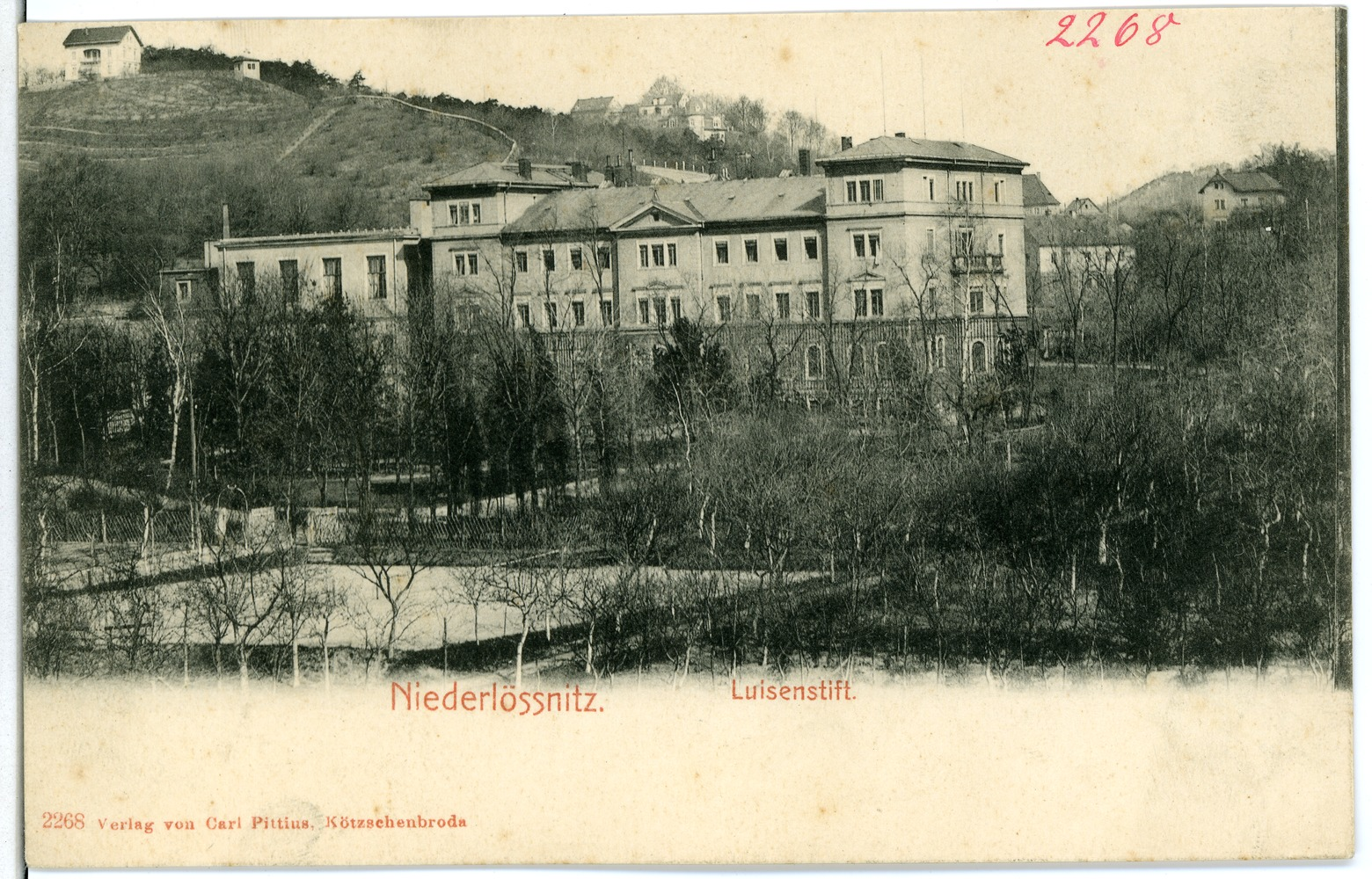 Niederlößnitz; Louisenstift This postcard is from publisher Brück & Sohn in Meißen ( postcard has a unique number 02268 and is available in a higher resolution at the publisher. This images was uploaded in a cooperation project between Wikipedians and the publisher.